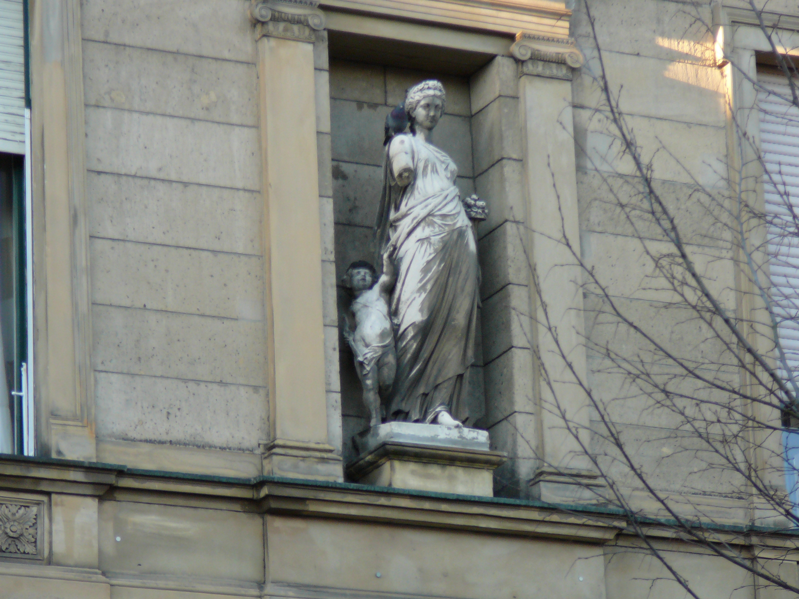 Briller Str, Wuppertal